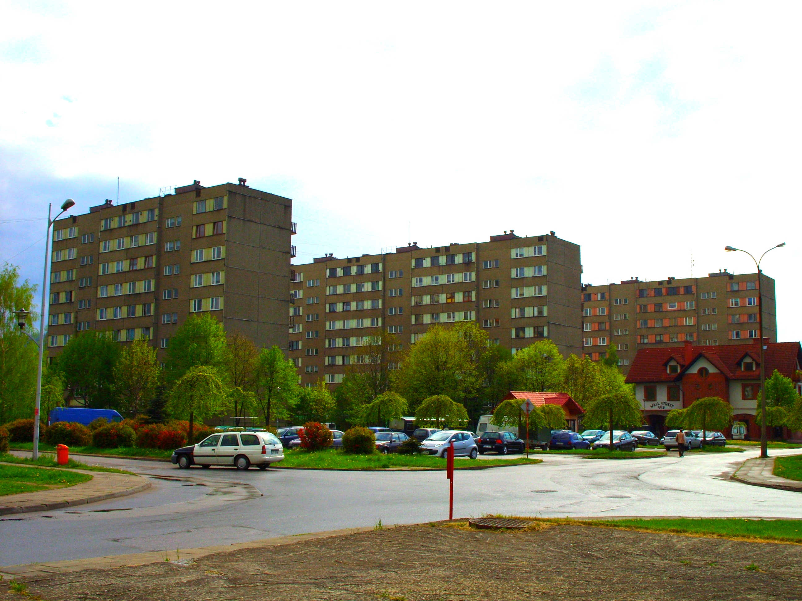 osiedle 700-lecia